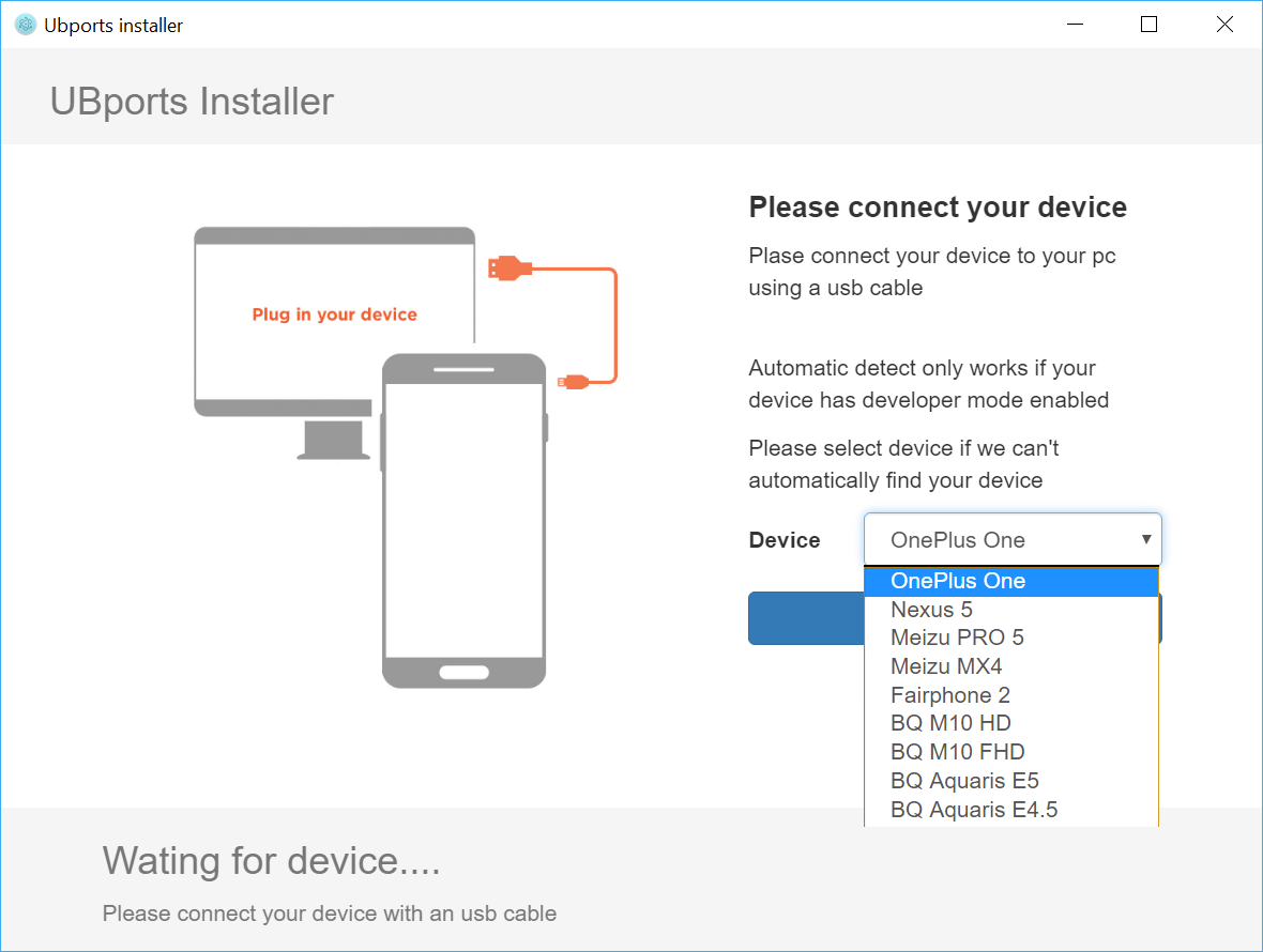 Installateur du système d'exploitation Ubuntu Touch